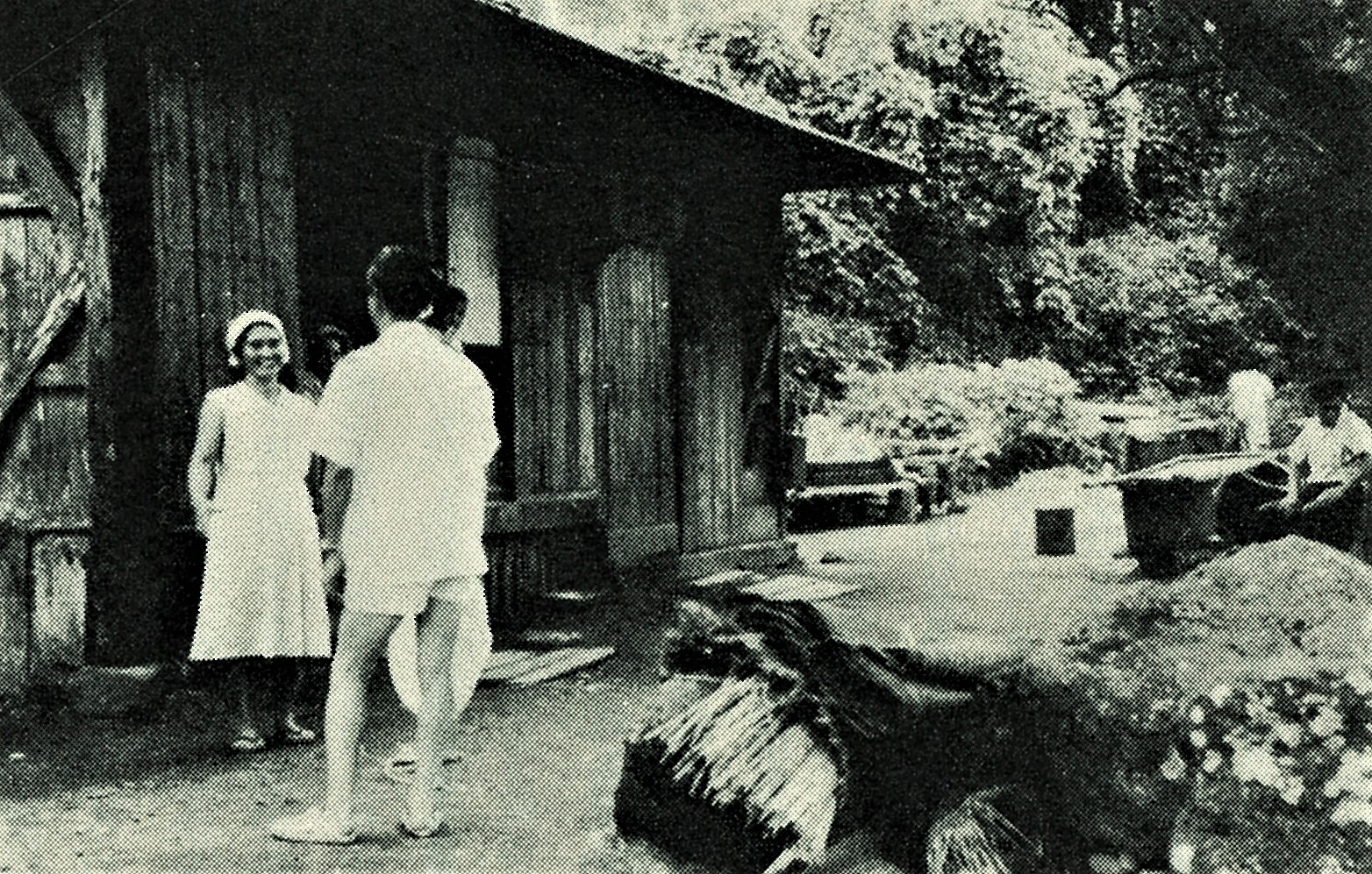 八丈小島鳥打地区の家（昭和30年頃）